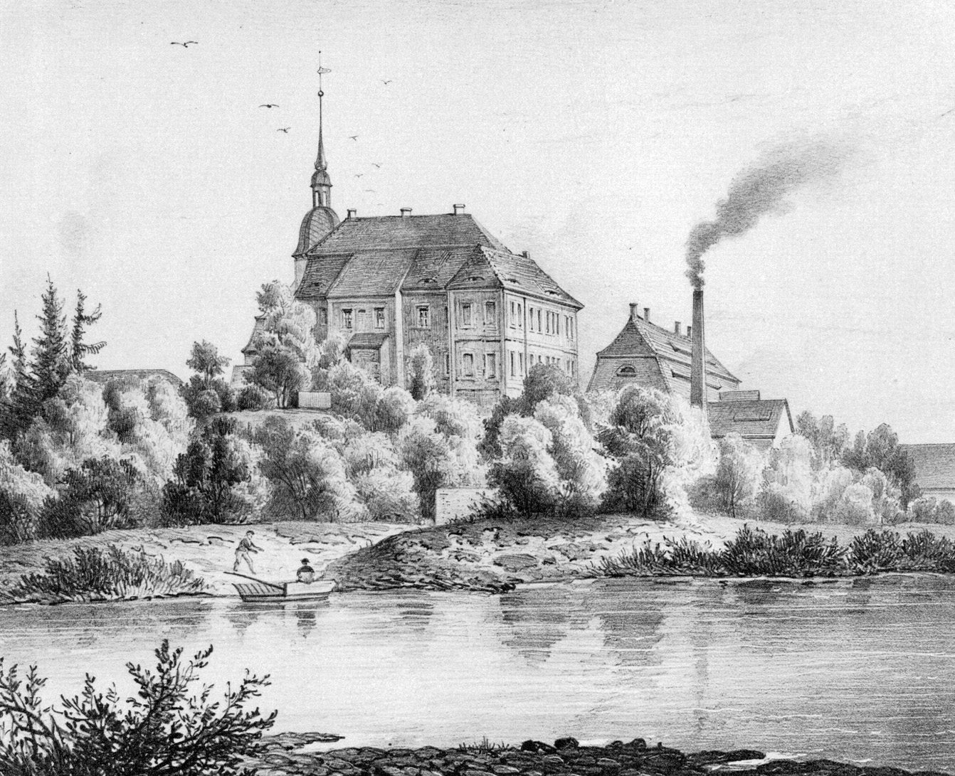 Das Gut Obernitzschka an der Mulde zwischen Grimma und Wurzen um das Jahr 1850